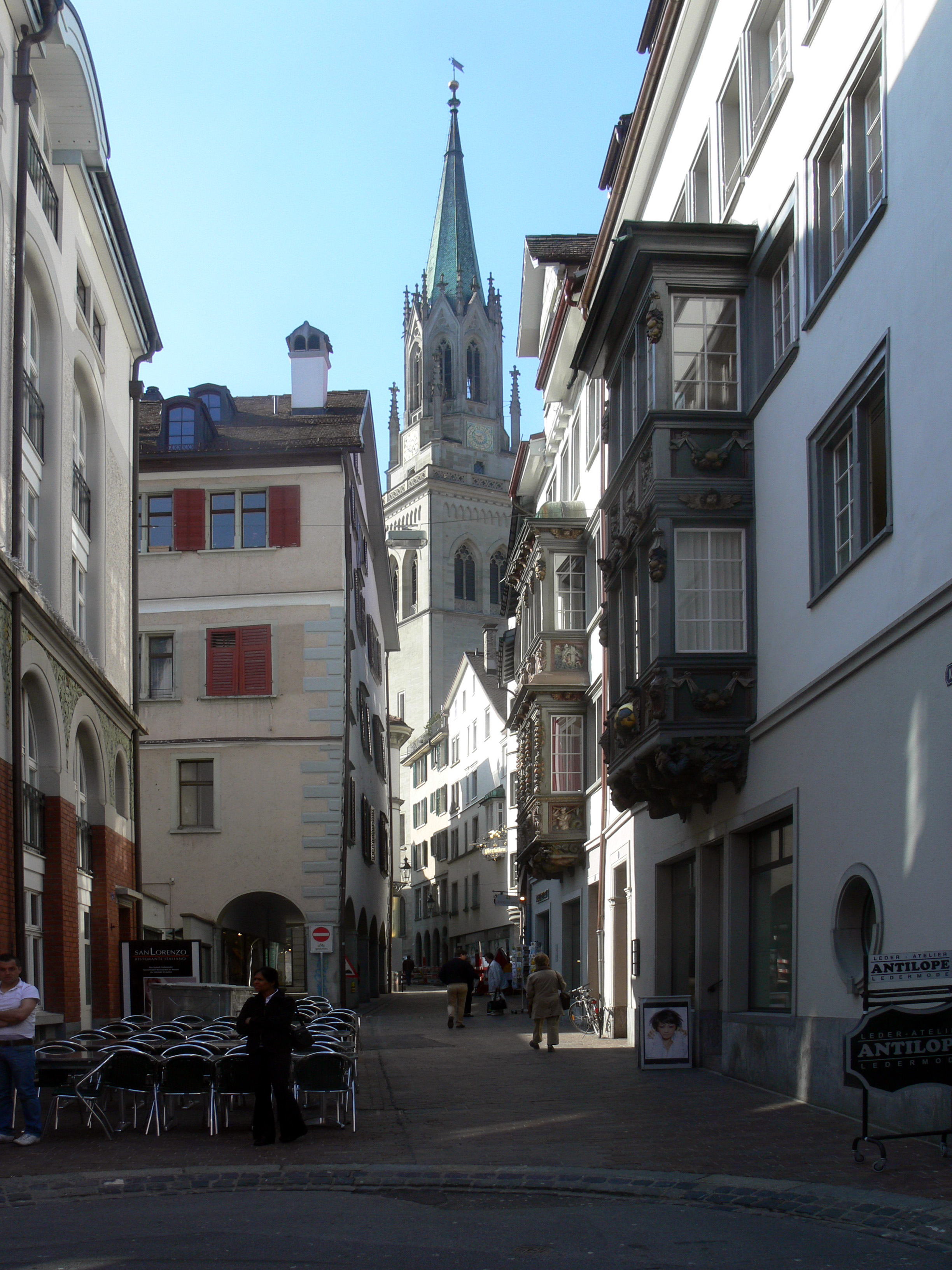 Straße in St. Gallen